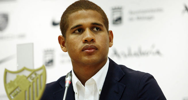 Roberto chen en su prestación en el Málaga CF.